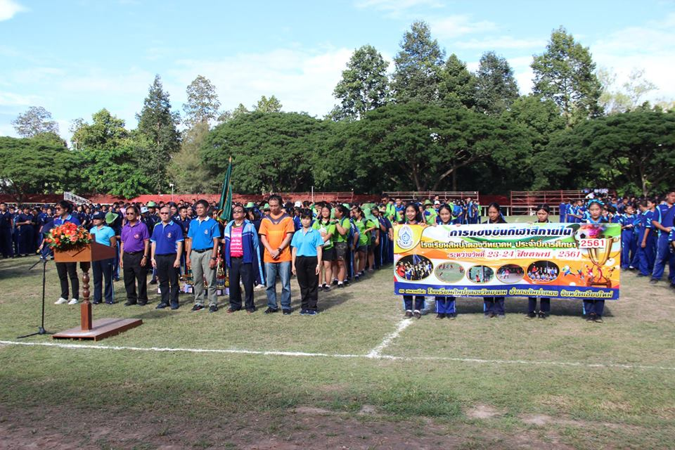 กีฬาสี 61 ส.ว.(3)